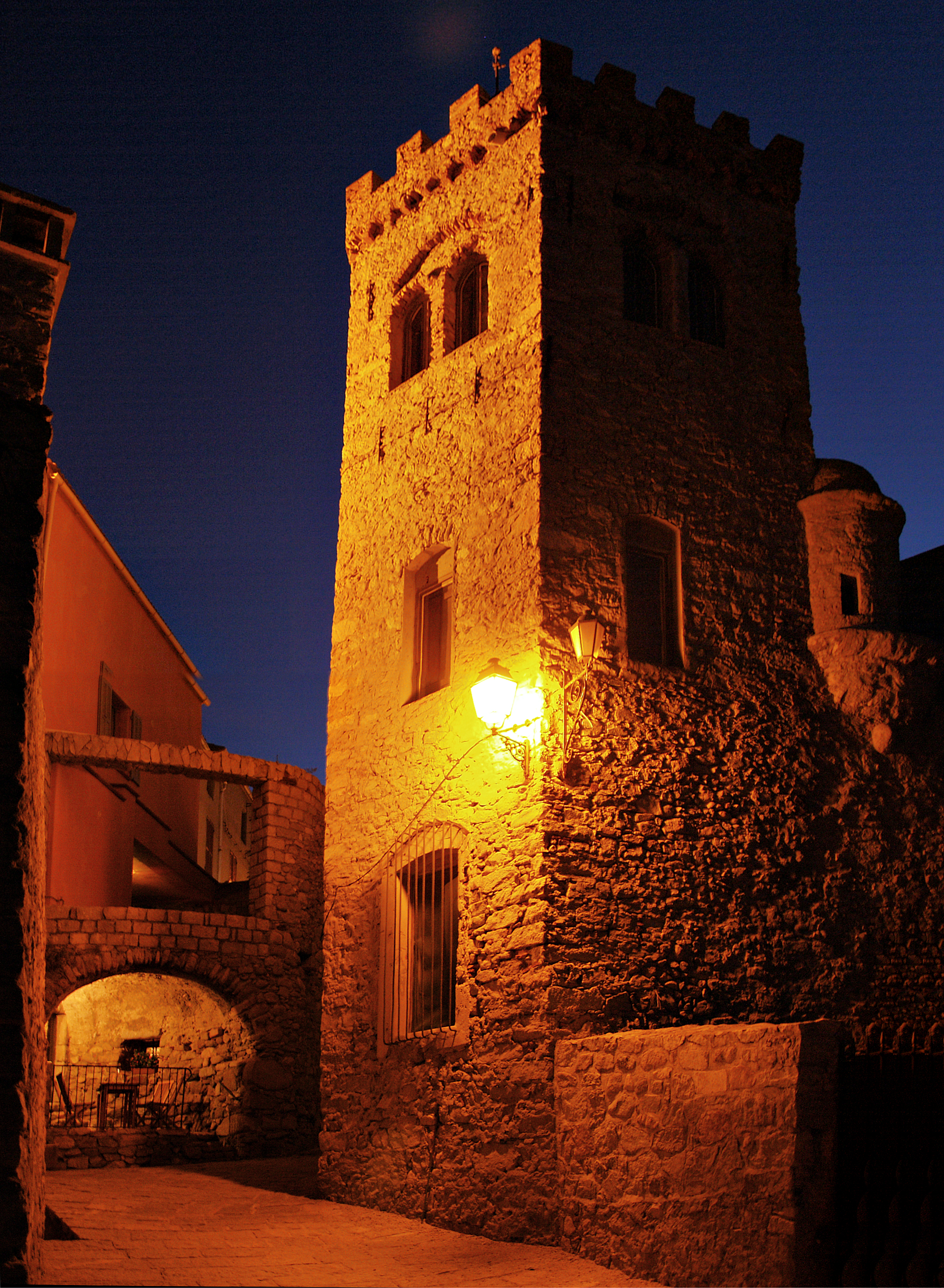 Algajola - Le château fort